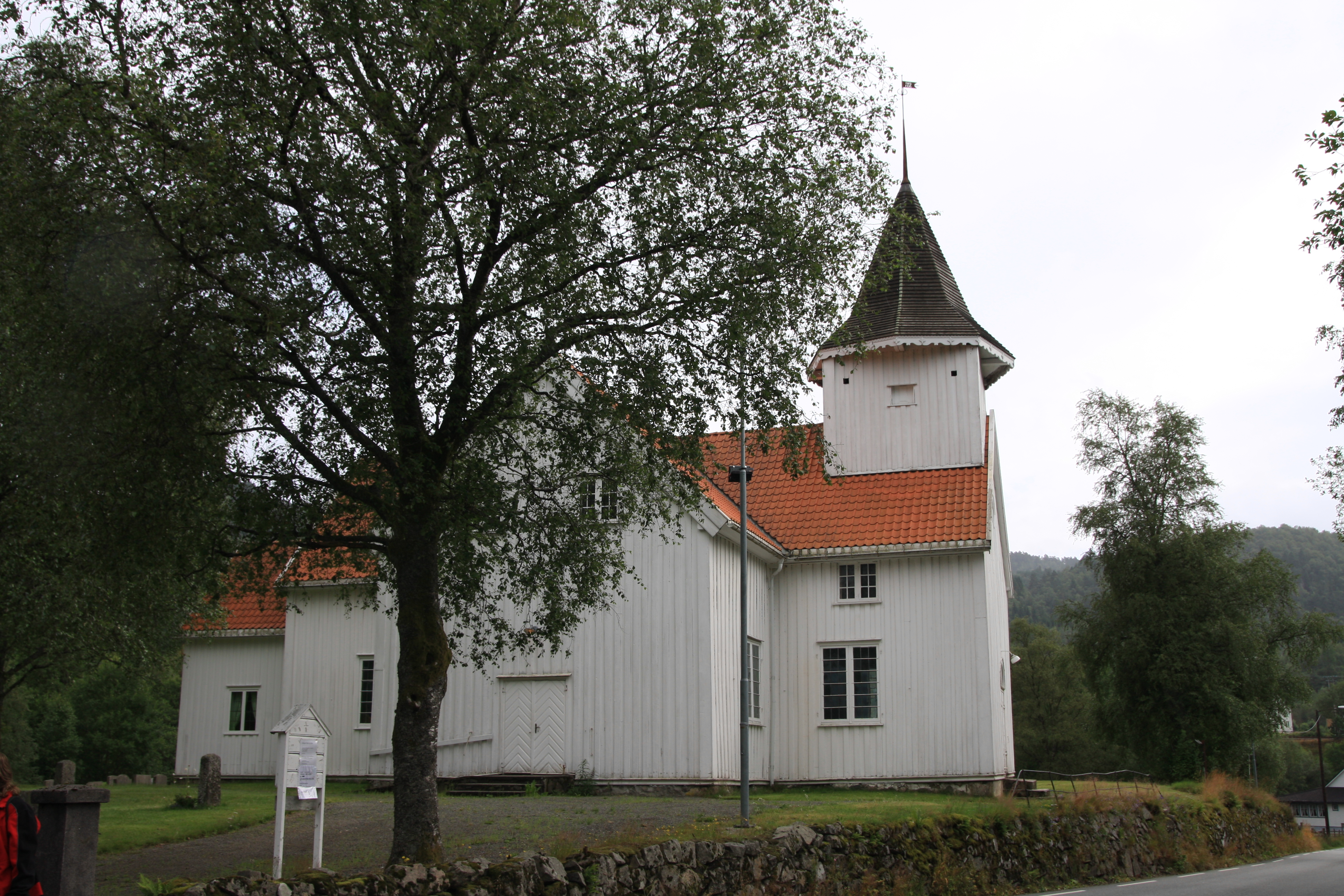 Bakke kirke